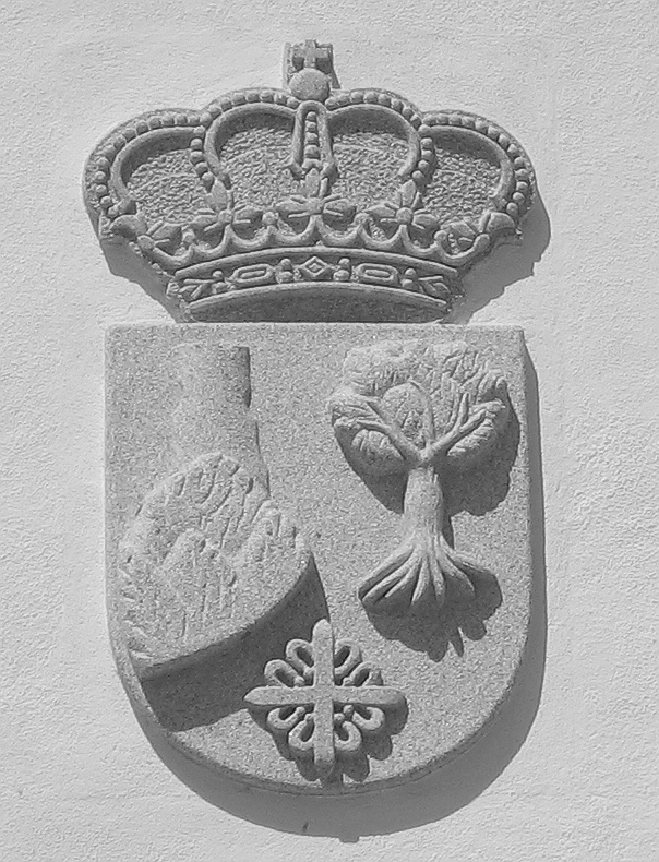 Escudo de piedra del municipio de Monterrubio de la Serena puesto en la fachada de la Casa consistorial (Ayuntamiento) situada en la Plaza de España.